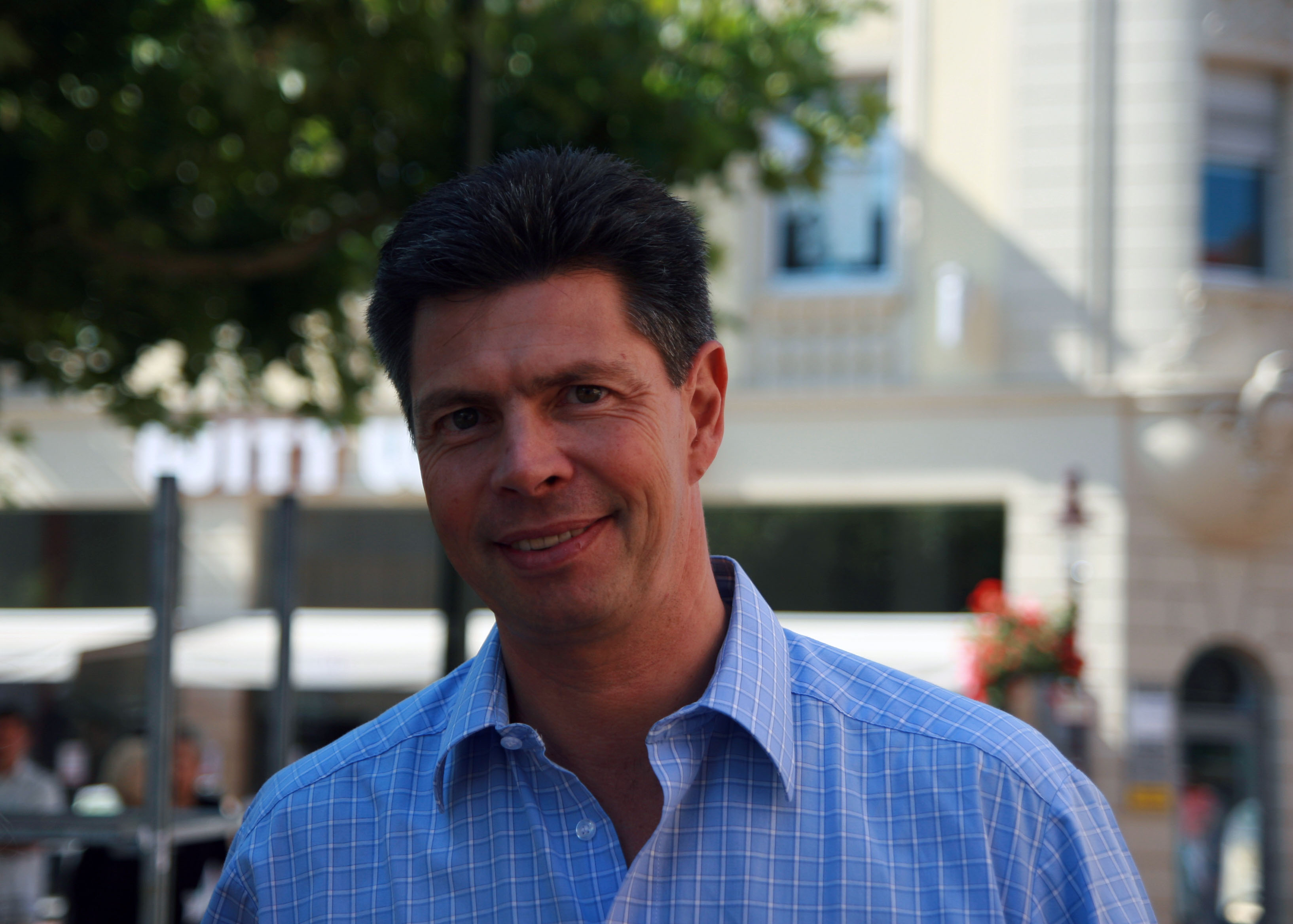 Herr Bürgermeister Christof Nitz. Kandidat der OB Wahl in Rastatt und Bürgermeister von Schopfheim. Das Bild wurde aufgenommen auf dem Rastatter Marktplatz.